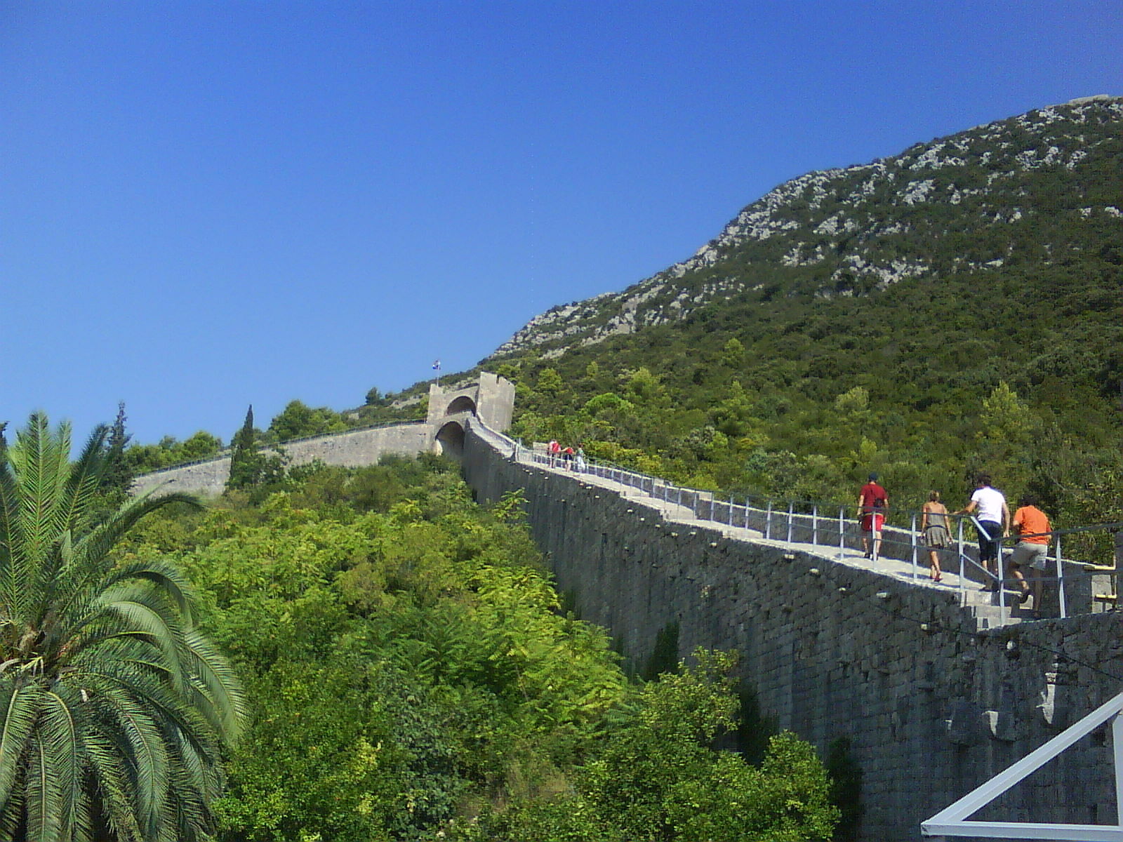 City walls of Ston